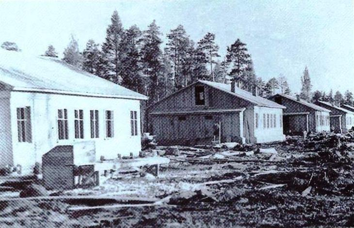 Первые дома на первой улице З.Космодемьянской. Цветной вариант данного фото обработанный нейросетью.